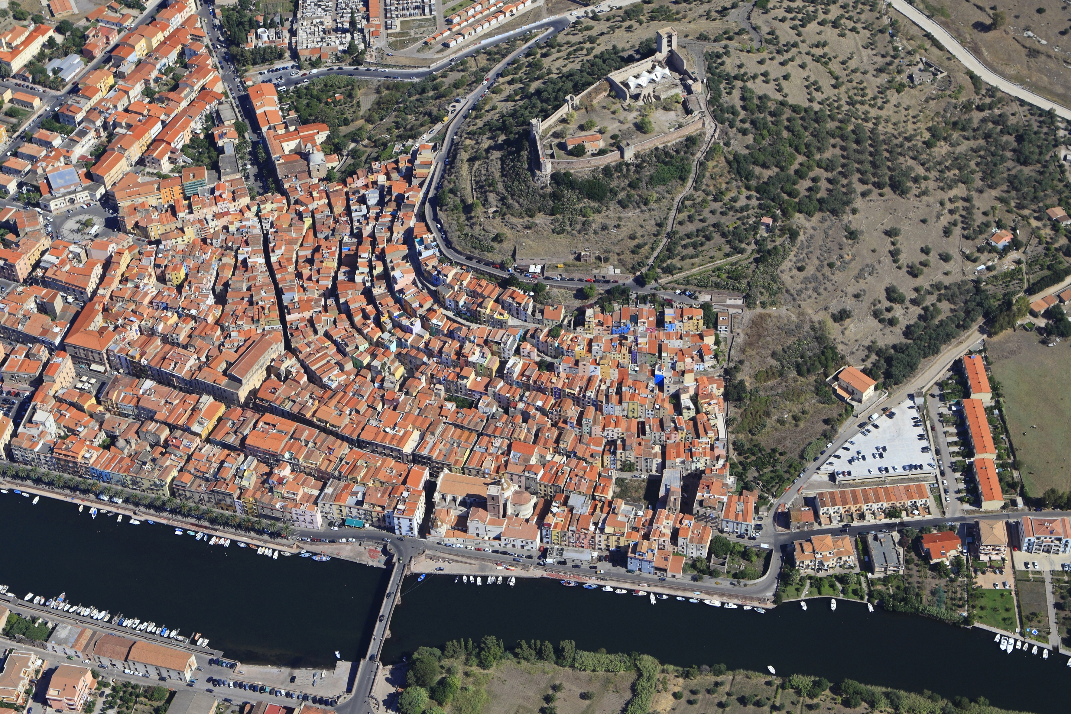 Foto aerea del centro Storico di Bosa This is a photo of a monument which is part of cultural heritage of Italy.